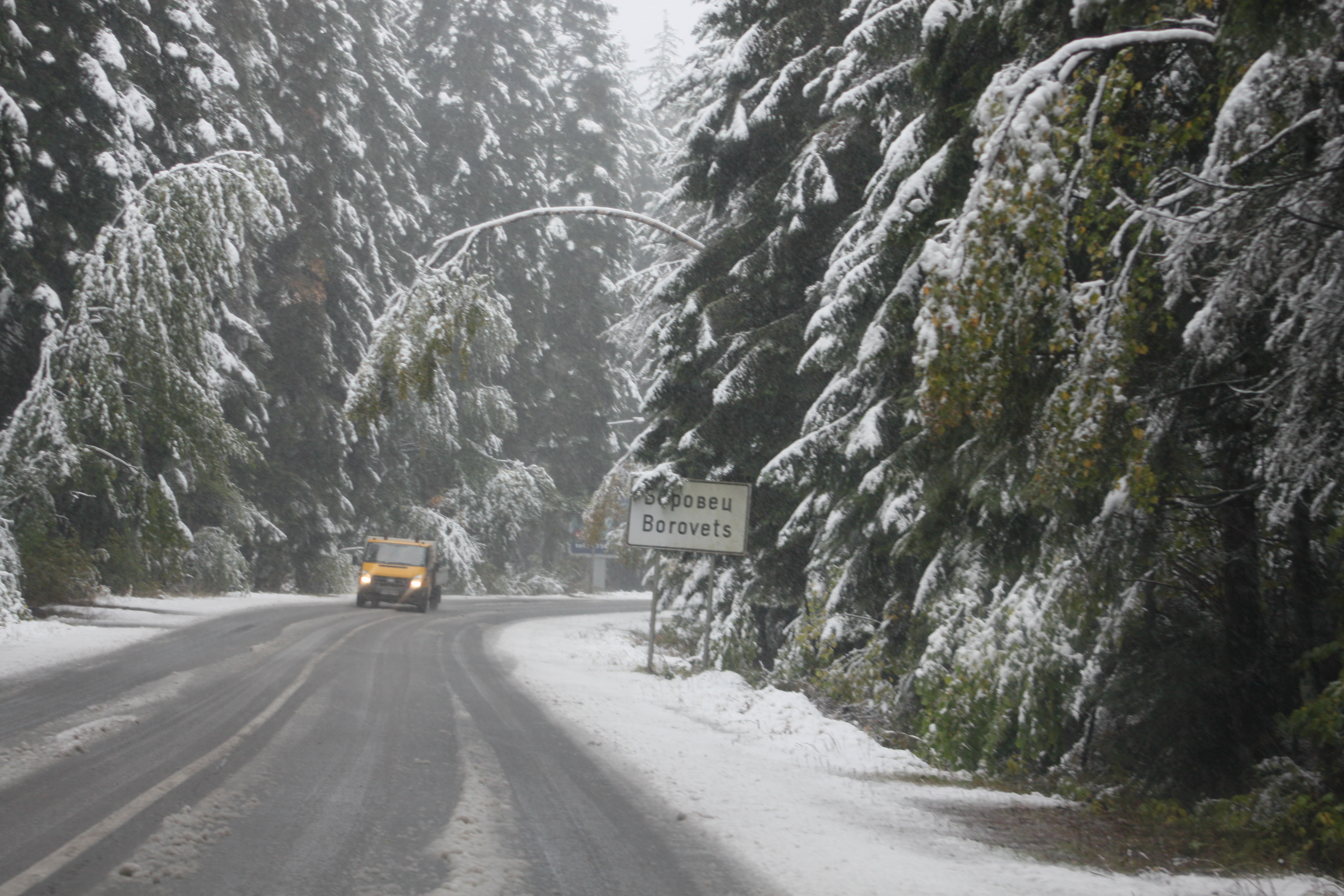 Botowez, Bulgarien